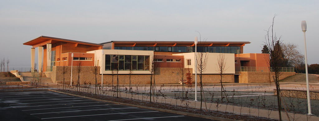 Salle des fêtes